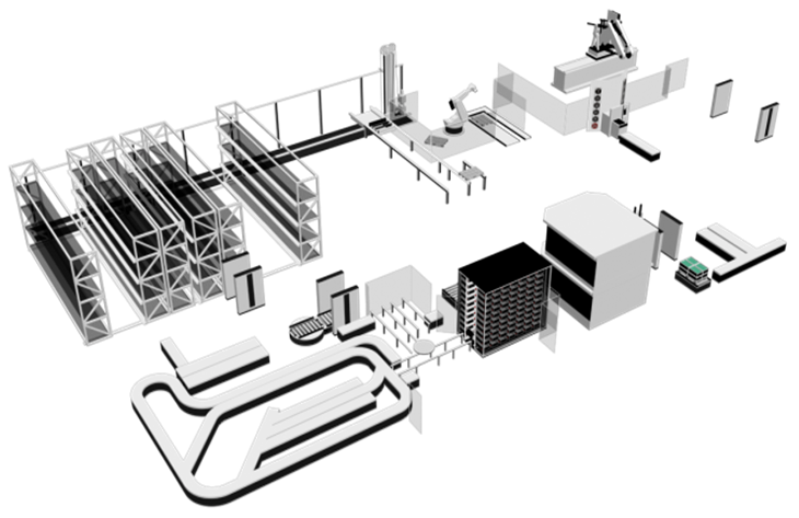 Skizzenhafter Aufbau des openID-centers